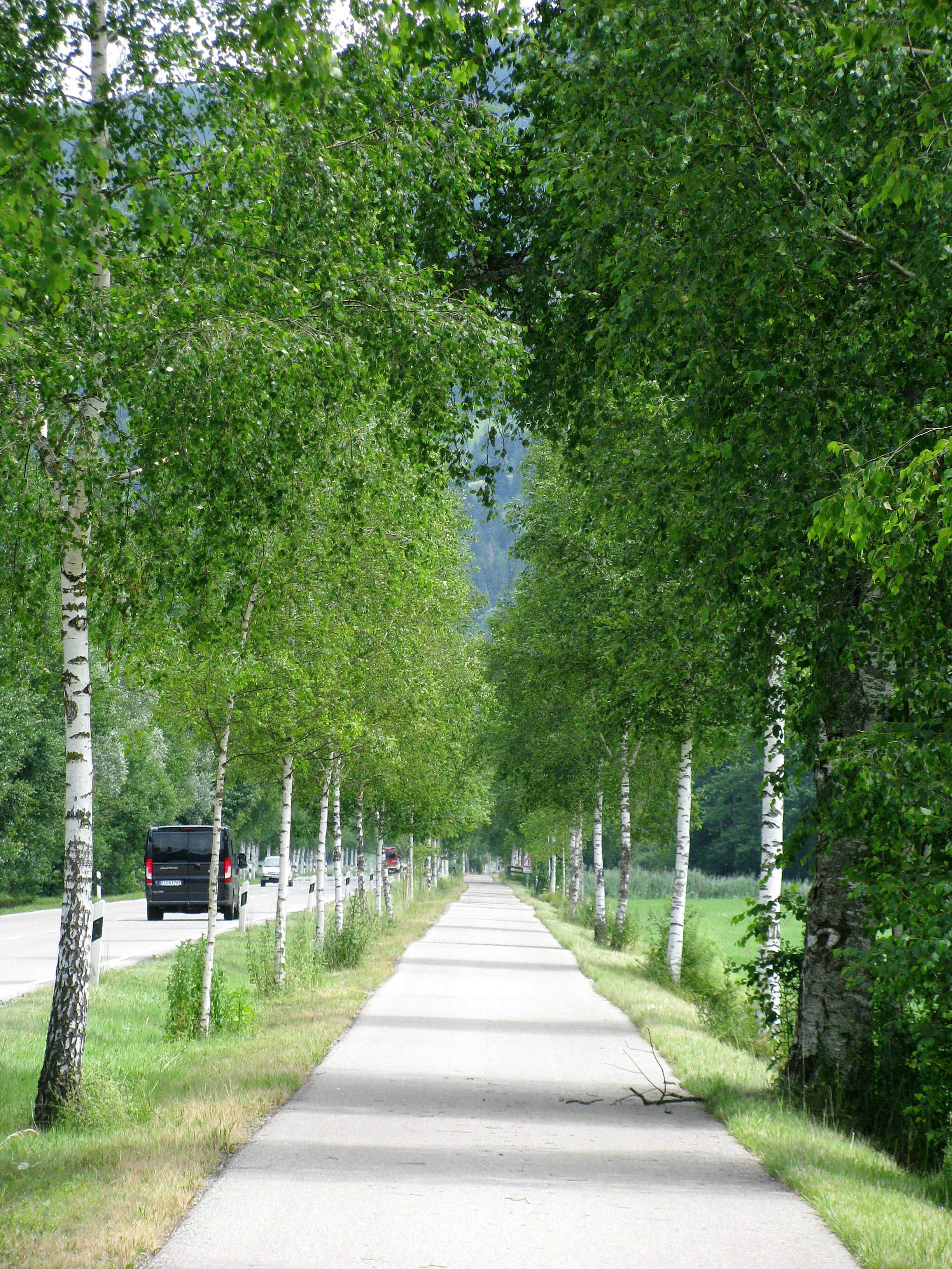 Birkenallee bei Immenstadt, Radweg neben der Staatsstraße